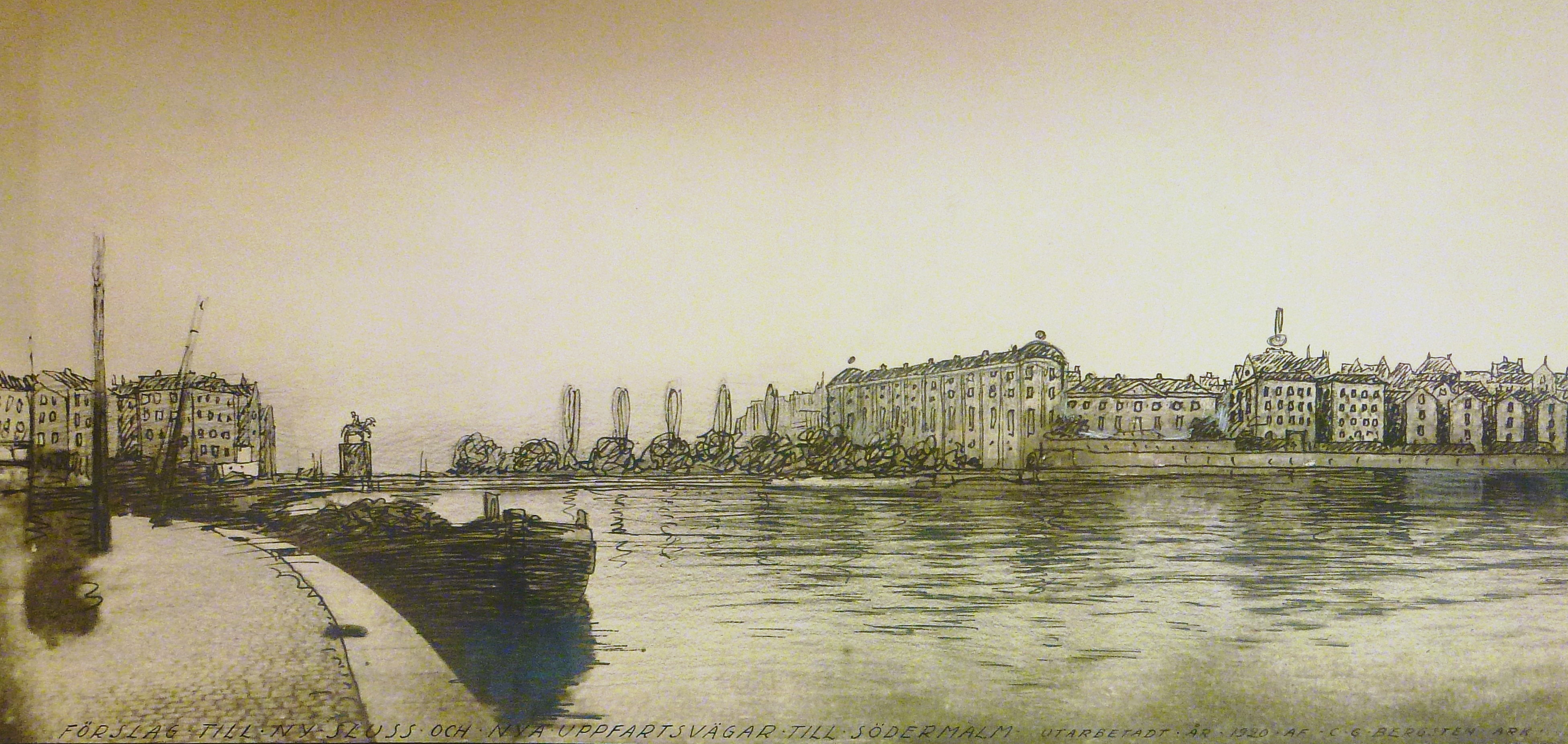 Förslag för Slussen av Carl Bergsten 1920, i Stockholms stadsarkiv ritningsarkiv.